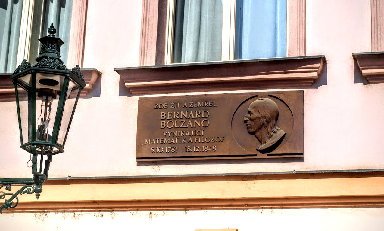 Dům Bernarda Bolzana v Praze